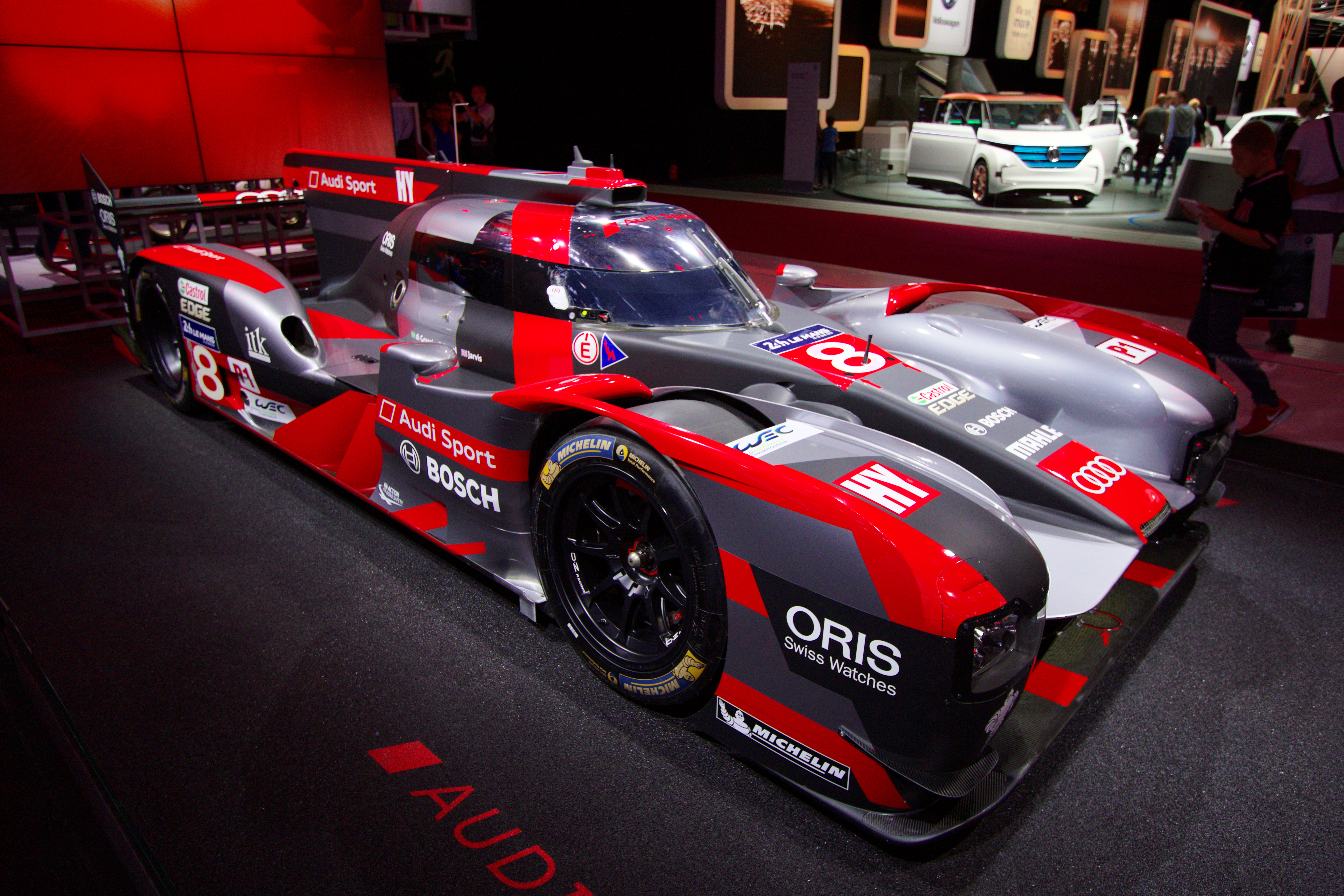 Une Audi R18 présentée lors du mondial de l'automobile de Paris 2016.